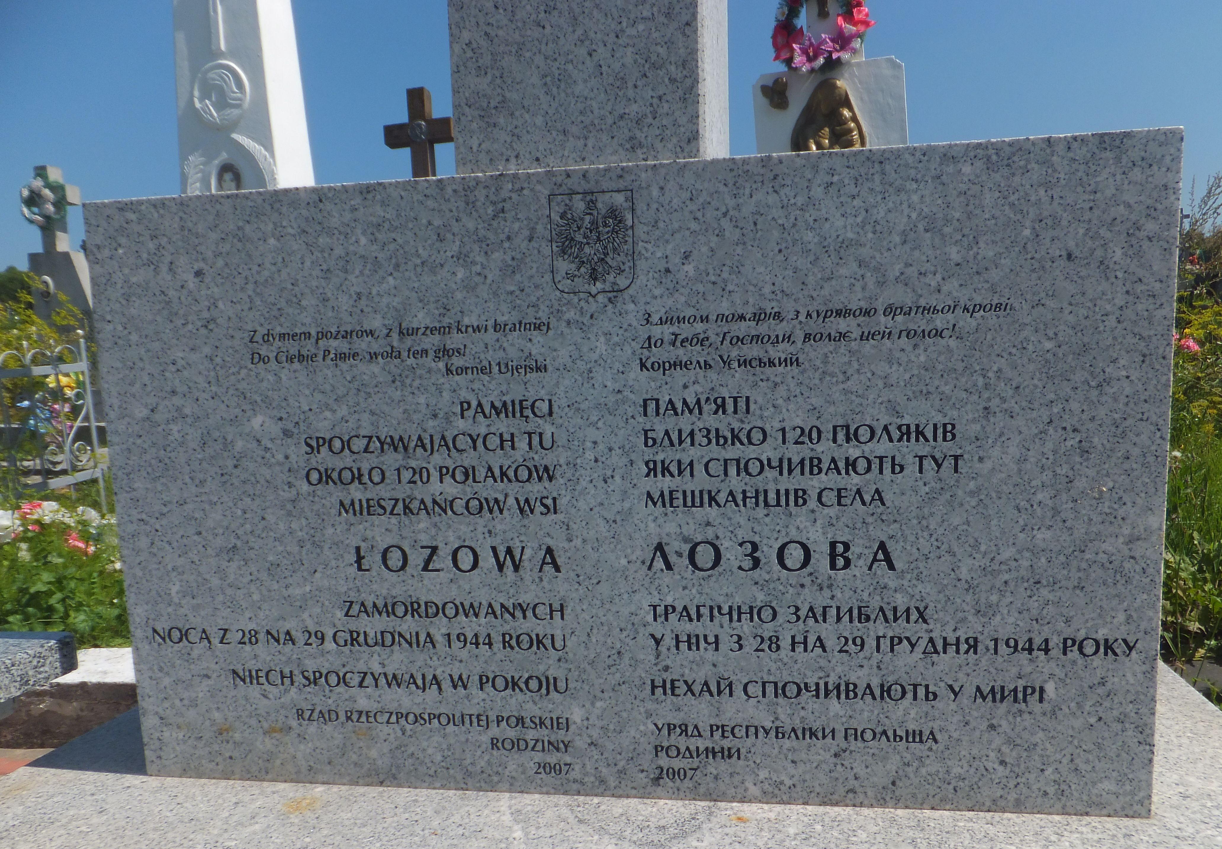 Pomnik w Łozowej